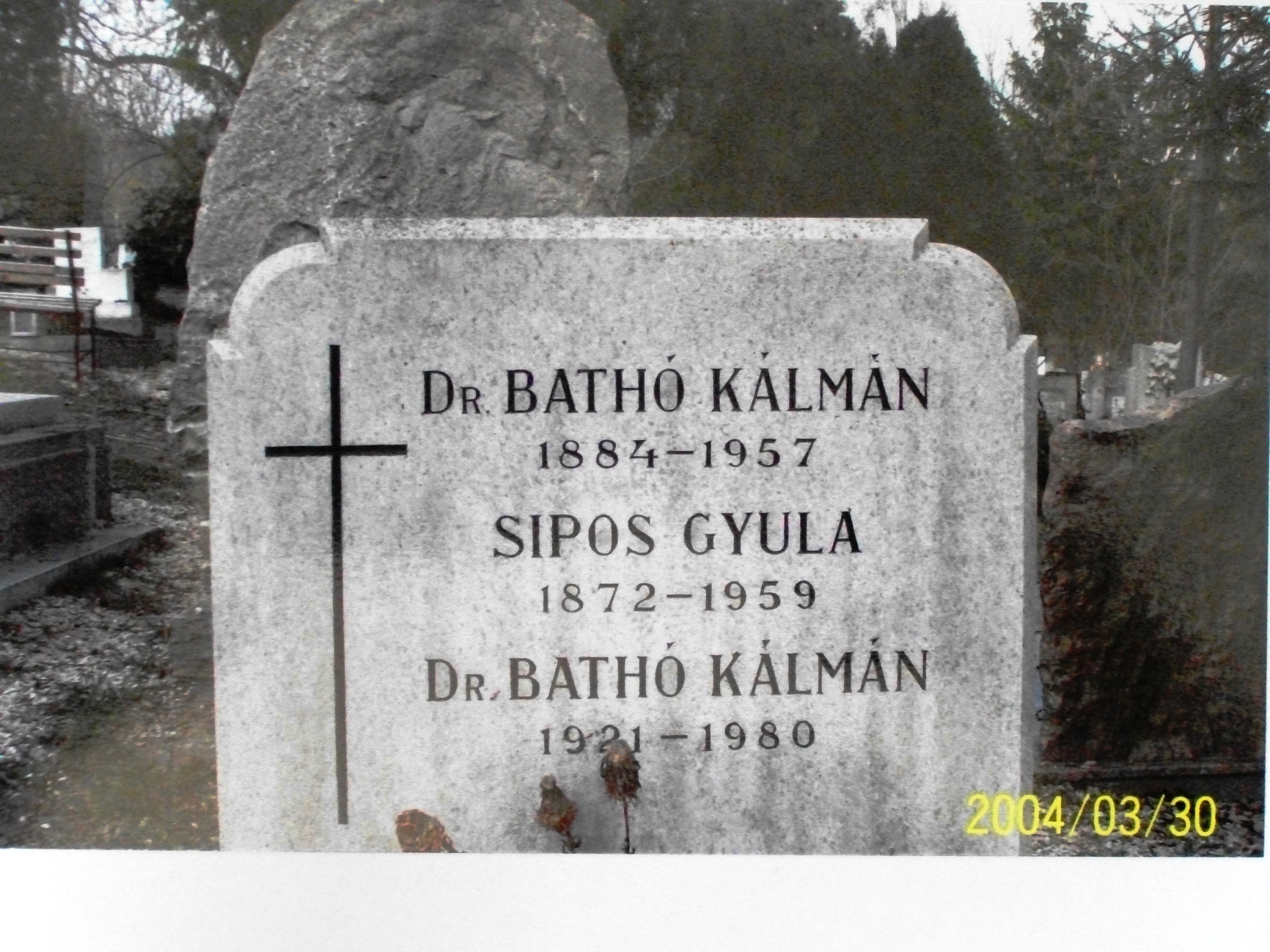 Sipos Gyula az egykori Magyar Királyi 17. Székesfehérvári Honvéd Gyalogezred parancsnokának sírja a Farkasréti Temetőben, 2004-ben